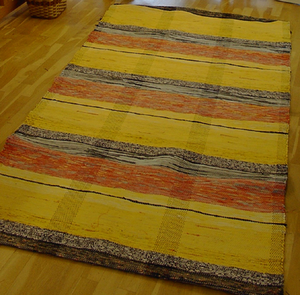 Trasmatta med varpeffekt. Observera att mönstret inte vänder på mitten.